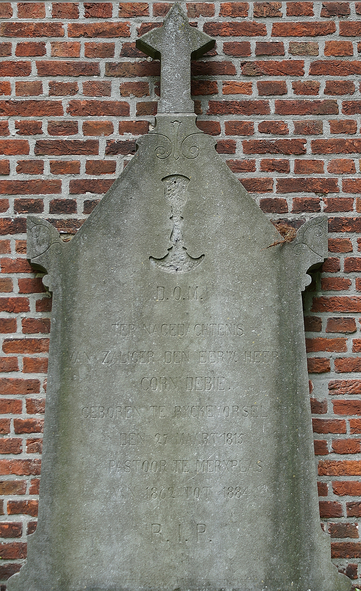 Sint-Willibrorduskerk (Merksplas) - Grafzerk van pastoor De Bie onder wiens impuls de kerk gebouwd werd